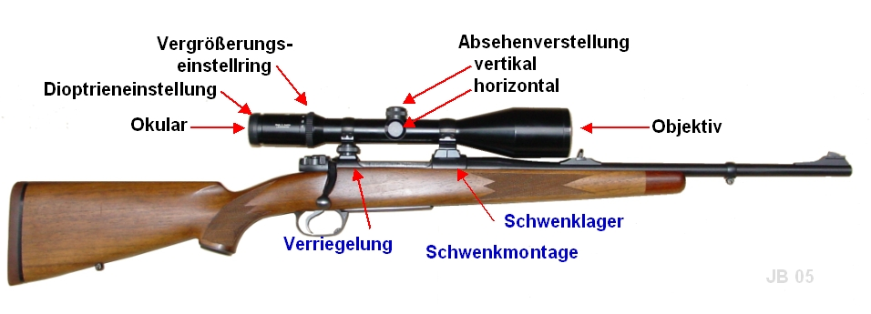 Bezeichnungen des ZF auf einer Waffe Foto + Grafik: Joachim Baecker 2005